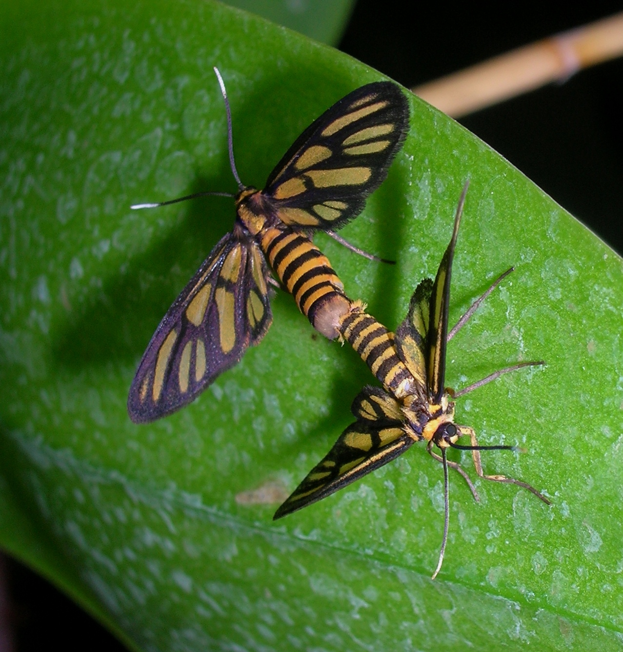 Amata sp. mating, San Mateo, Cagayan Valley, Philippines